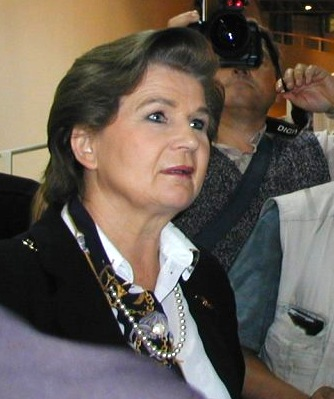 Valentina Tereškova toimittajien ympäröimänä tiedekeskus Heurekassa 14. syyskuuta 2002. / Valentina Tereshkova surrounded by reporters at science centre Heureka on September 14, 2002.